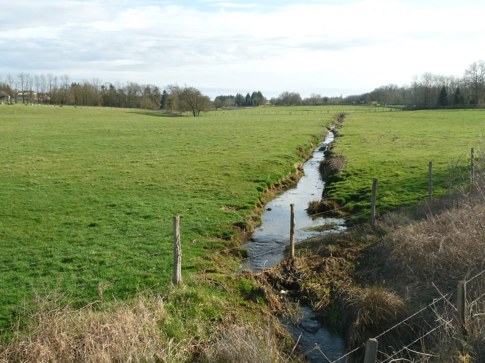 la Ligonne à Marillac-le-Franc, Charente, France